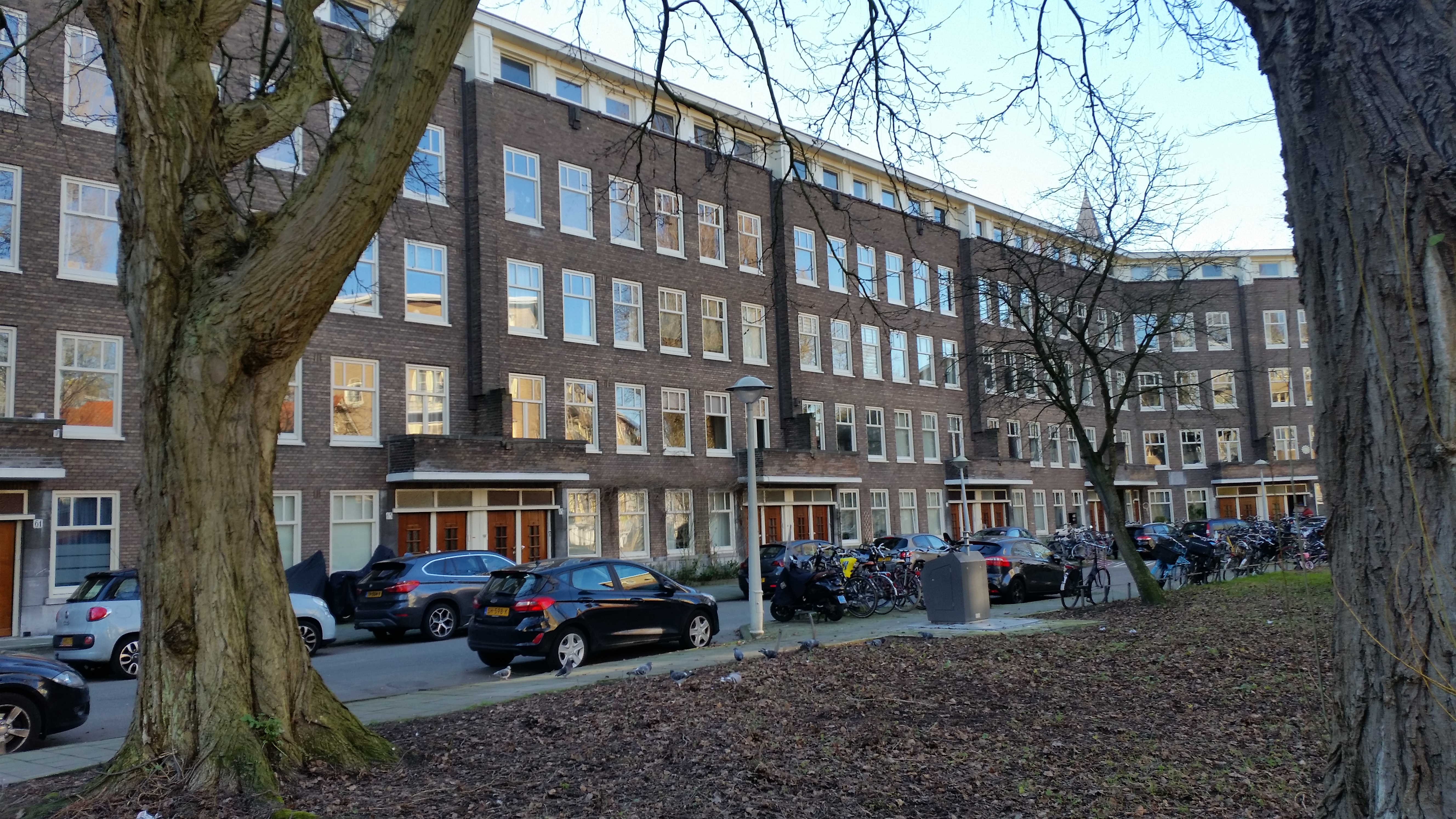 Van links naar rechts Kijkduinstraat 61 tot 79 bij de knik; Amsterdam-West